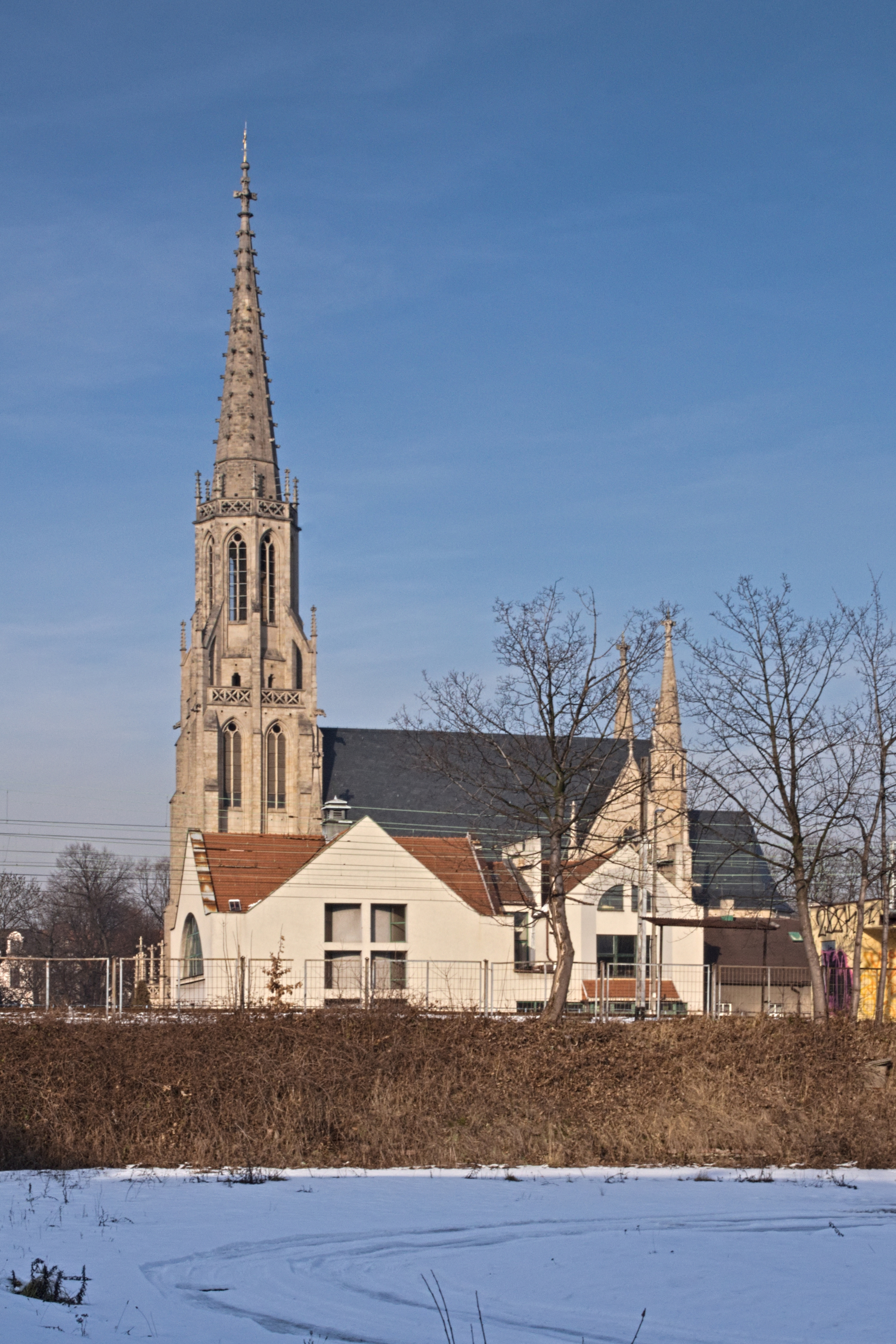 kościół Mariacki w Katowicach, widok od południa, z okolicy ul. Wojewódzkiej, przed kościołem widoczne zabudowania pod adresem plac ks. E. Szramka 2.